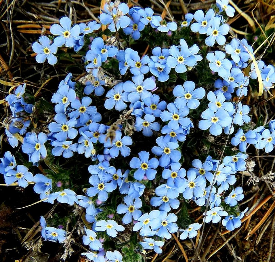 Myosotis in Eastern Siberia